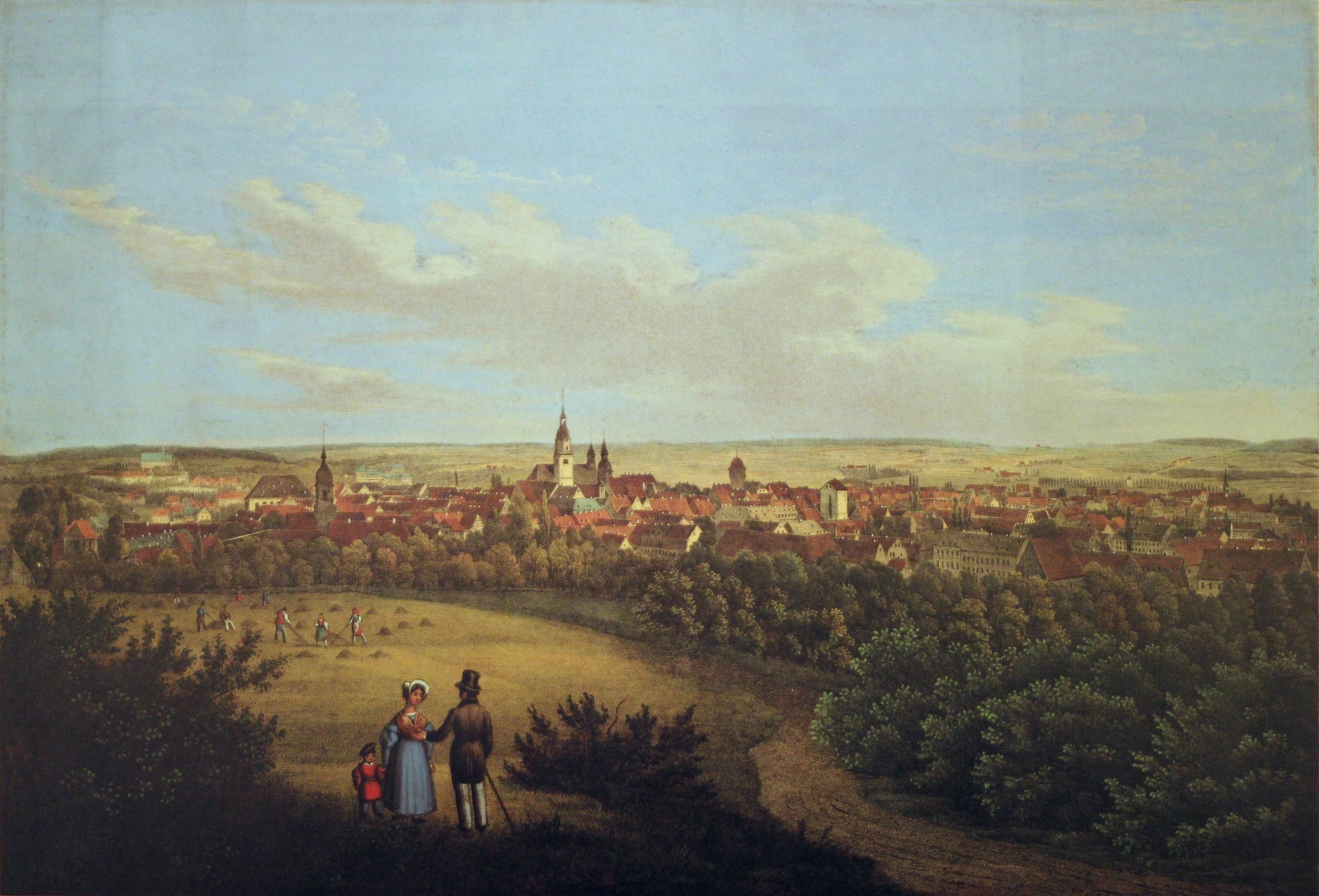 Blick auf Chemnitz vom Hüttenberg um 1840